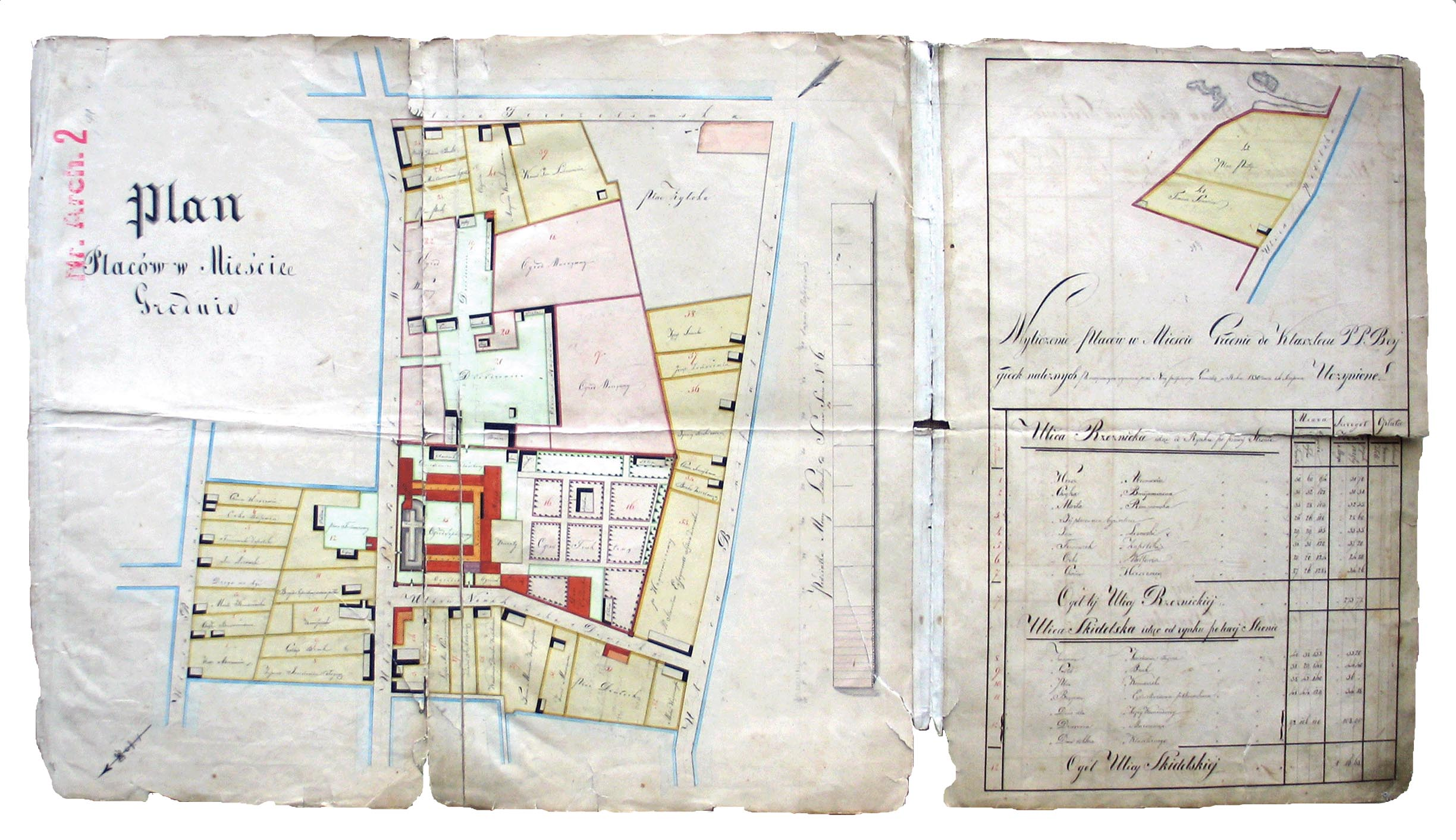 Архіўная назва: 2.КП - 8495. Plan Placów w Mieście Grodnie. Wyliczenie Placów w Mieście Grodnie do Klasztoru PP.Brygidek należnych po uczynionym wymiarze przez Niżej podpisanego Geometrę w Roku 1830 dnia 14 Sierpnia Uczynione [подпіс адсутнічае]. План 1830 г. Выкананы магчыма ў Гродна. Маштаб: у цалі 10 сажаняў ці [1 : 840]. Рукапіс каляровы, папера, на паперы вадзяны знак: “Wilna. F.Langenbach. Z 9.”. Памер аркуша: 96,3 × 50,5 см. Арыентаванне: паўднёва-ўсходняе. Прадстаўлены пляцы ў Гродна, якія належалі кляштару брыгітак. У легендзе падаецца спіс пляцаў гродзенскіх брыгітак, іх плошча і прозвішчы арэндатараў.